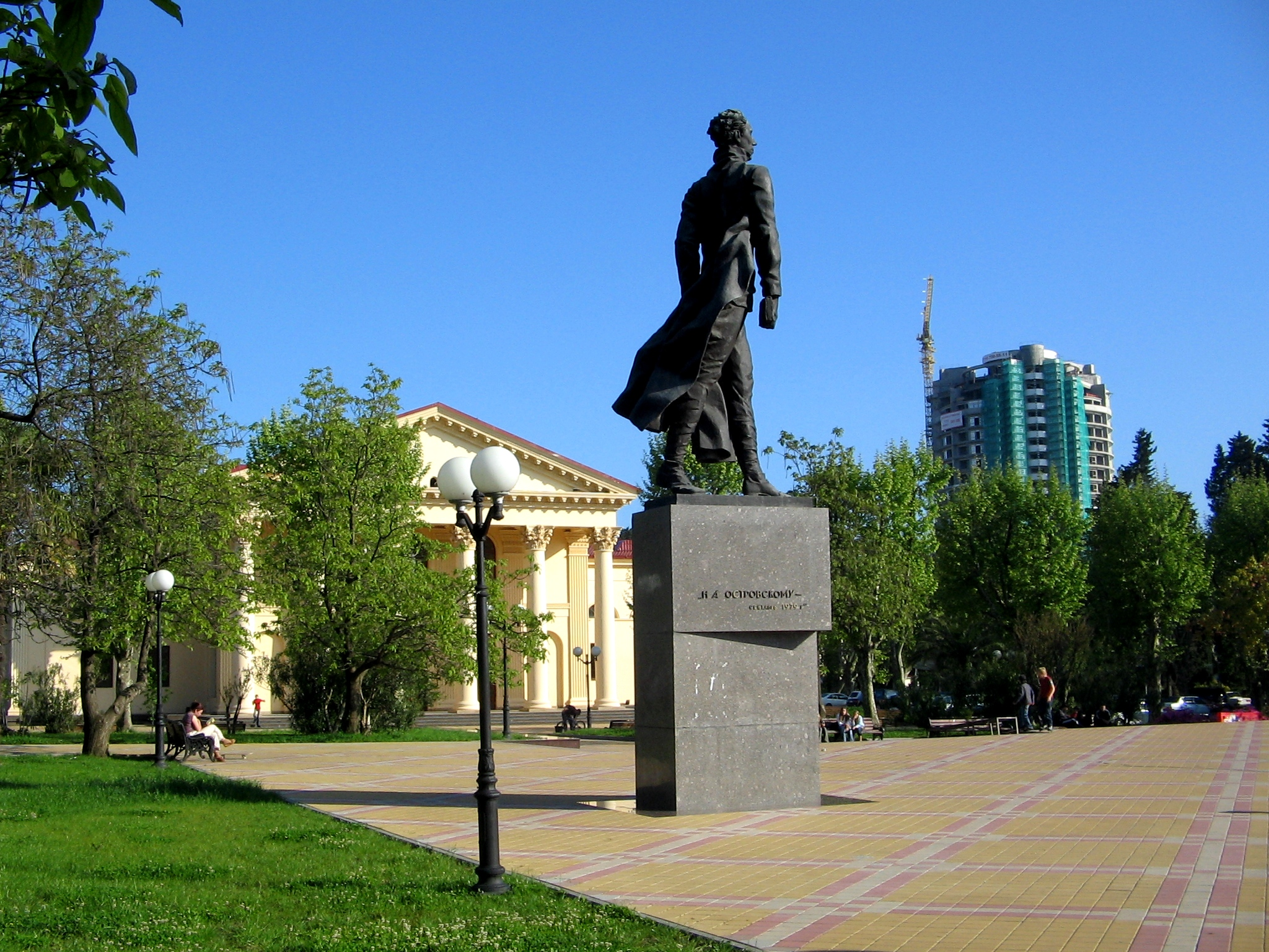 Памятник Островскому в Сочи